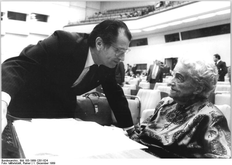 ADN-ZB Mittelstädt 1.12.1989 Berlin: 13. Volkskammer-Tagung Prof. Gertrund Sassa (r.) , Stellvertreter des Vorsitzenden der LDPD-Fraktion, im Gespräch mit Fritz Krausch, Vorsitzenden des Bezirksverbandes der LDPD.